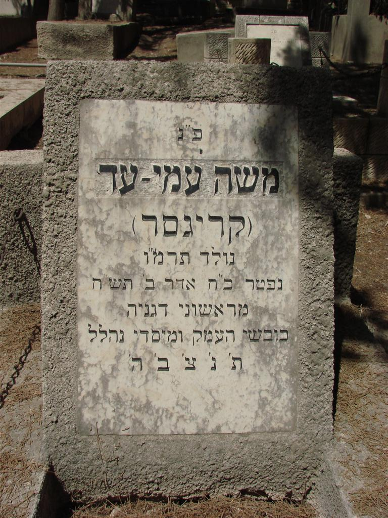 משה עמיעד קריגסר